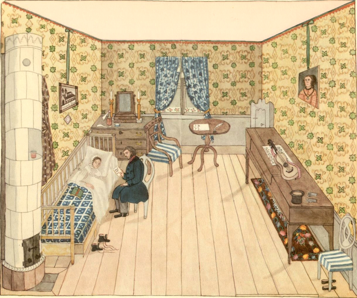 Doktor Levin på sjukbesök i Maria Högbergsgata 60